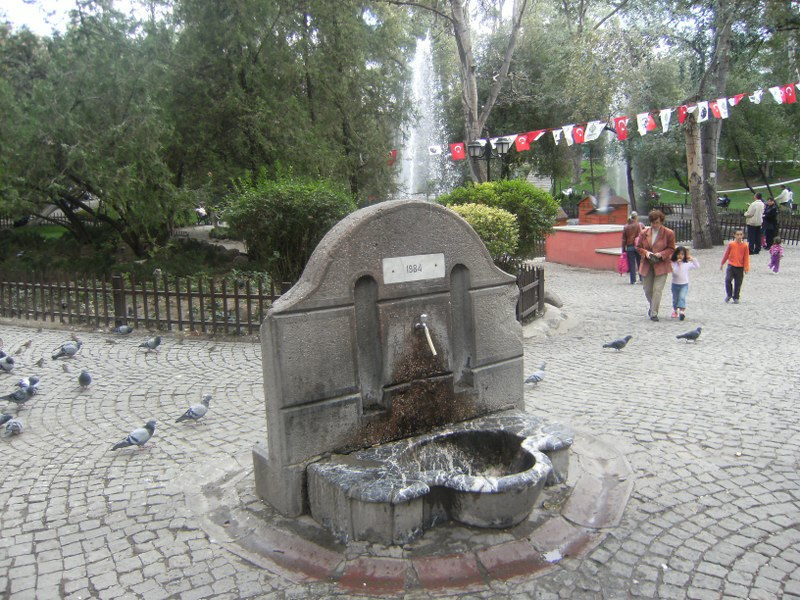 Kuğulu Park'tan görünüm